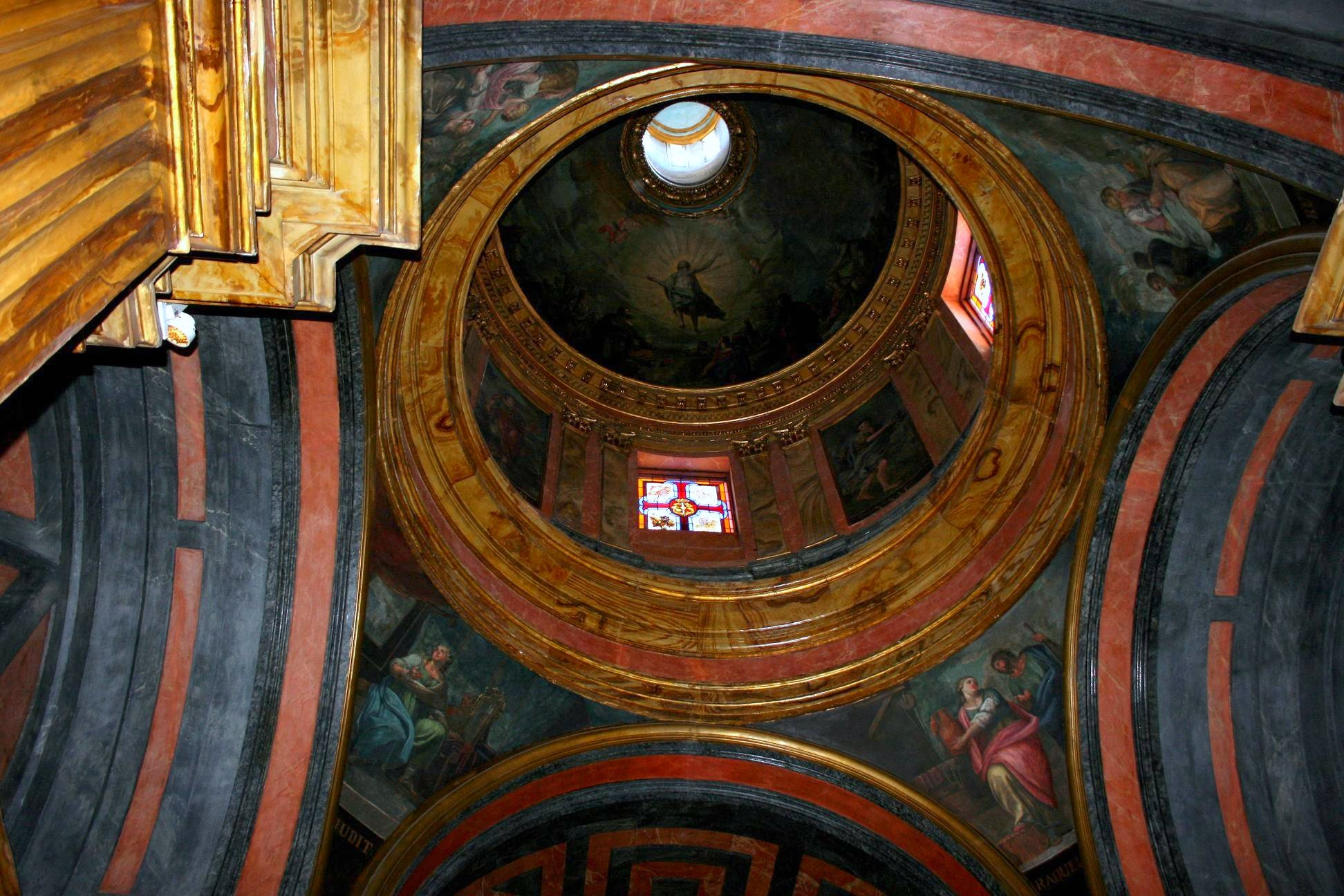 Interior de la cúpula de la Real Capilla del Santísimo Cristo de la Redención, o Capilla del Cristo, en la parroquia de San Ginés, Madrid, obra de Juan Ruiz, 1646-1672. Pinturas al fresco de José Sánchez Villamandos, fines siglo XVIII.